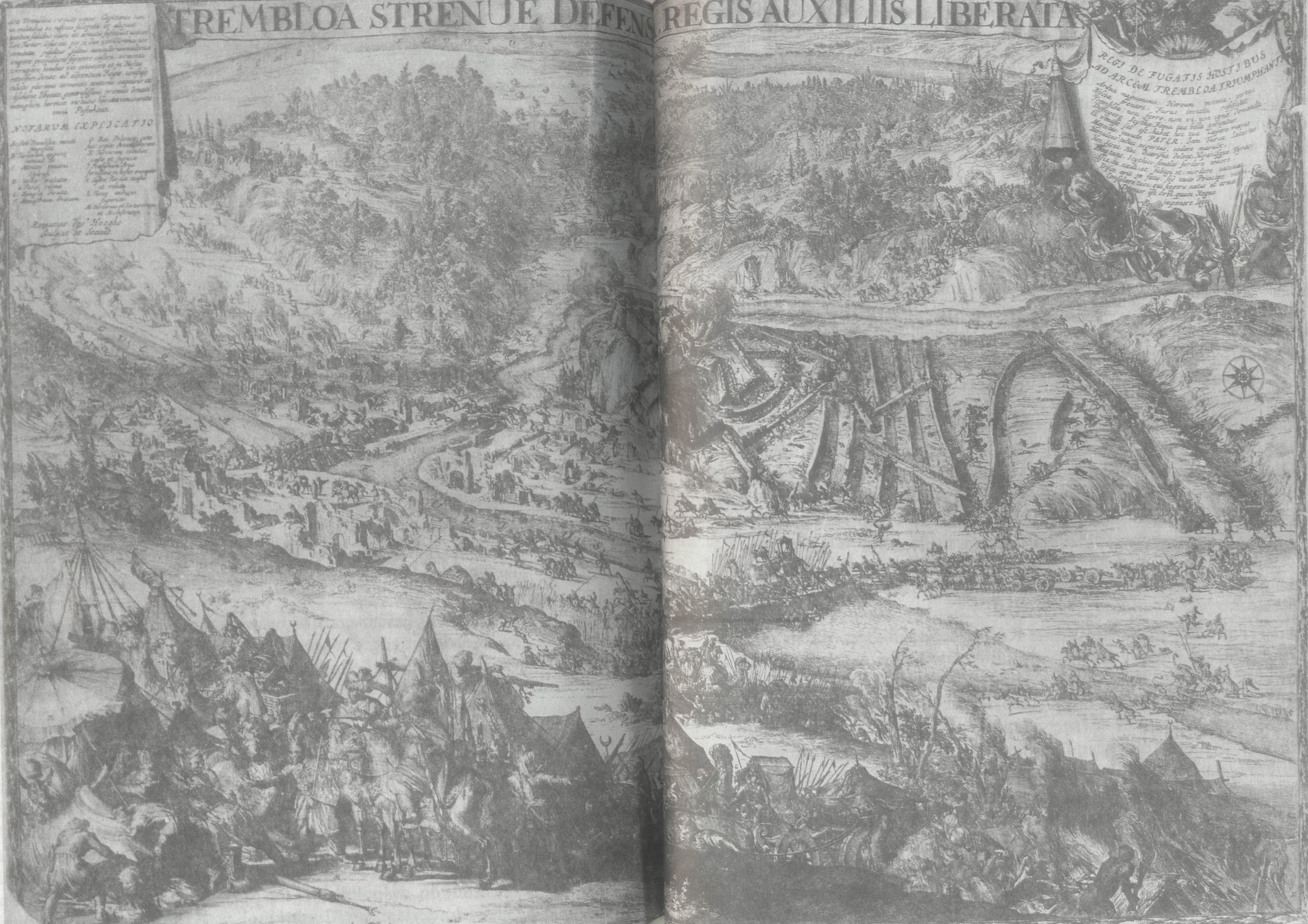 Die Belagerung von Trembowla während des Osmanisch-Polnischen Krieges 1672–1676